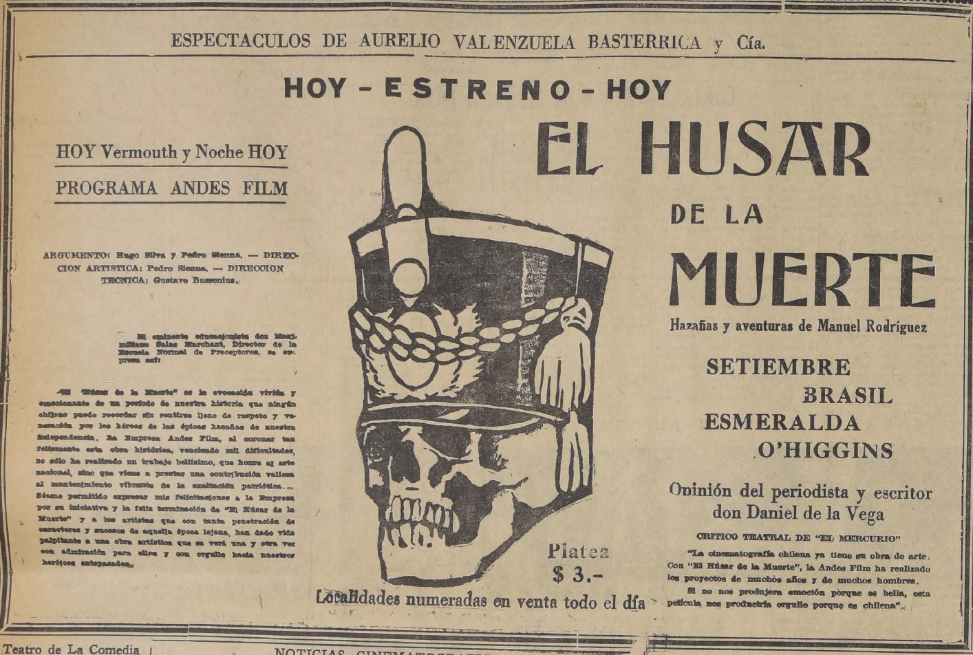 Afiche aparecido en el Diario La Nación del estreno de la película de 1925 "El Húsar de la Muerte".